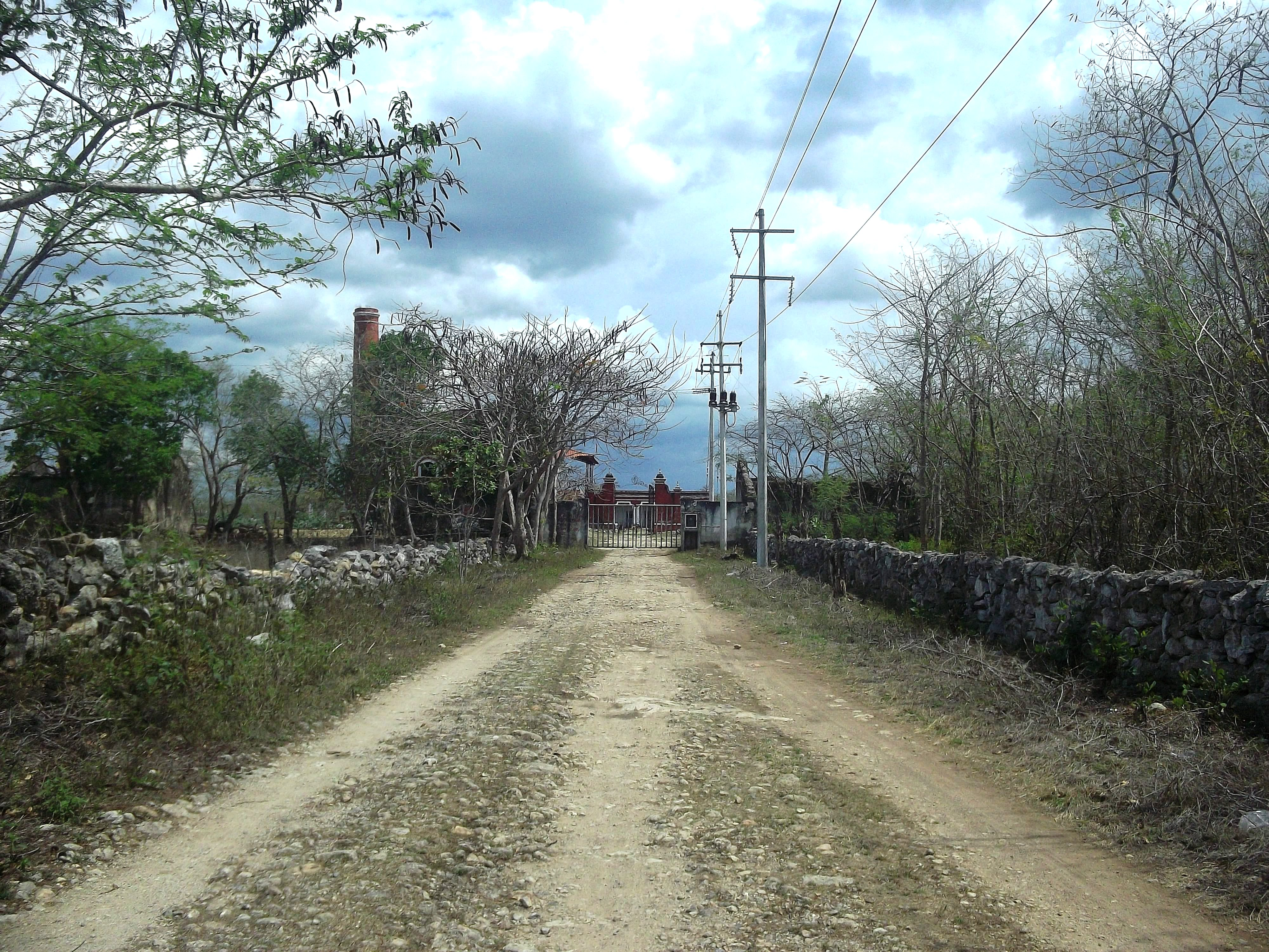 Entrada a la hacienda Sahcabá.